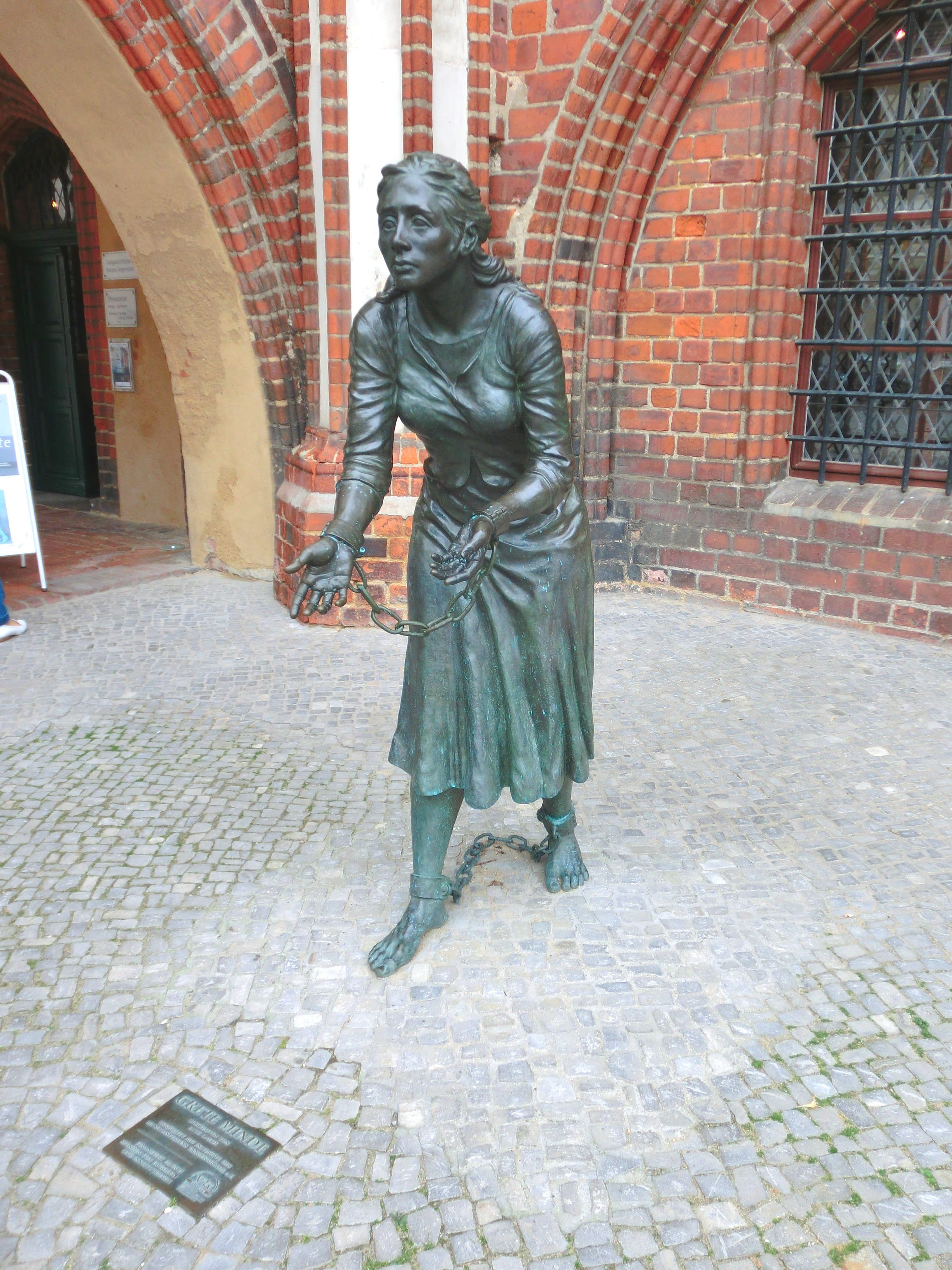 Tangermünde Rathaus, Plastik Grete Minde